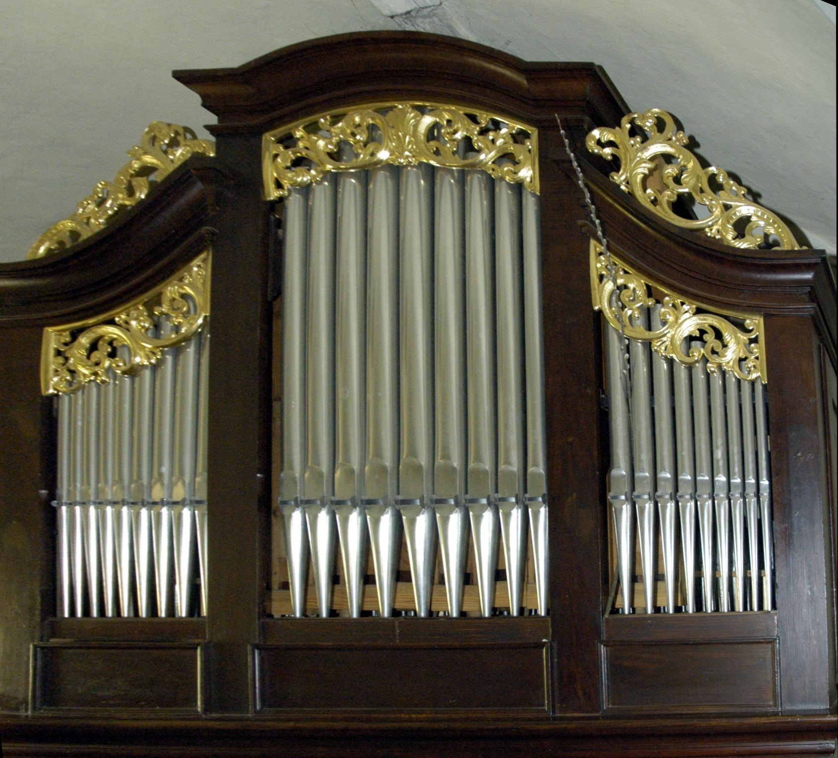 Orgel der Kath. Pfarrkirche hll. Peter und Paul in Sonnberg